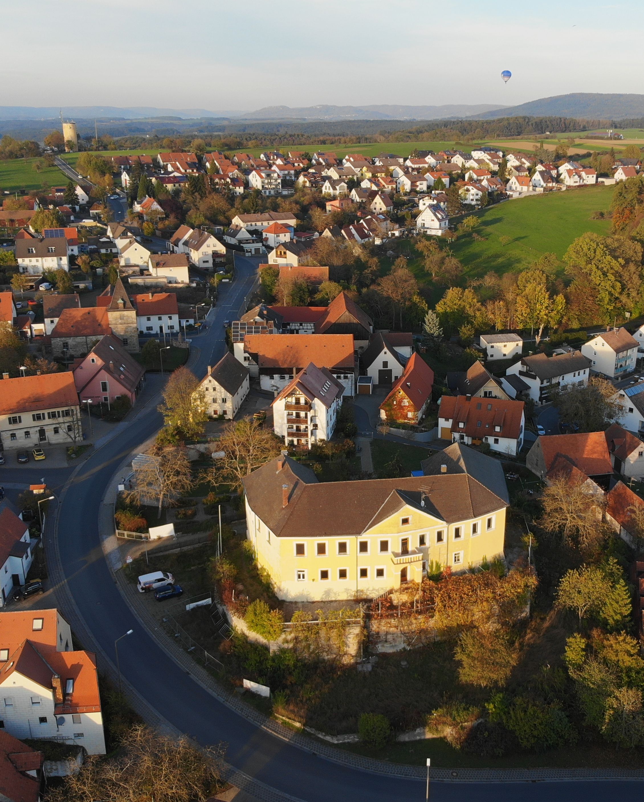 Marloffsteiner Schloss Luftaufnahme (2019)